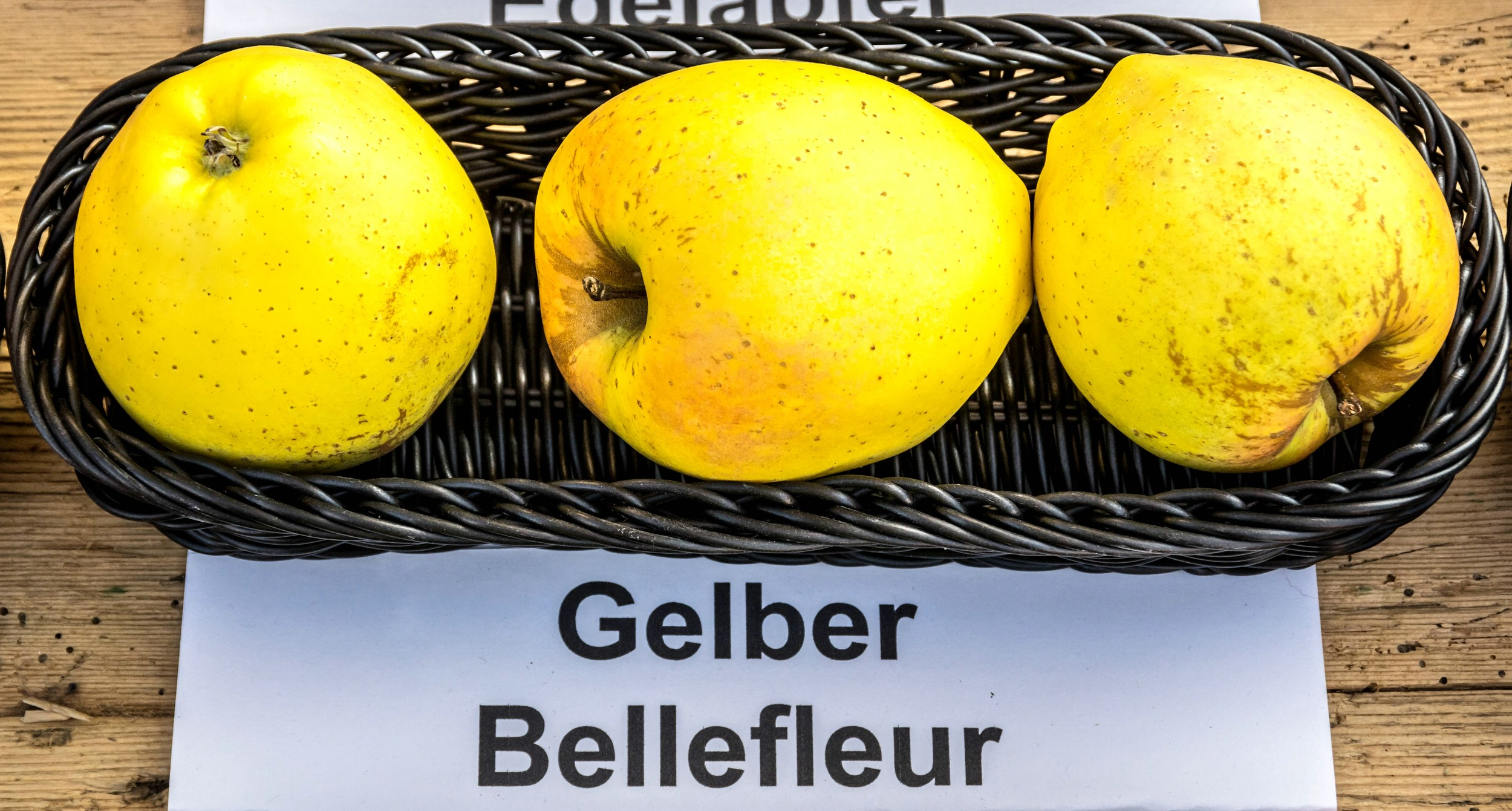 Alte Apfelsorten, von denen es im Badischen noch tragende Bäume gibt. Alle Aufnahmen au dem Oktober 2015